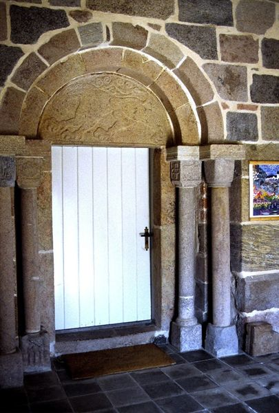 Grønning Kirke sydportal, Skive Kommune, Jylland, Denmark